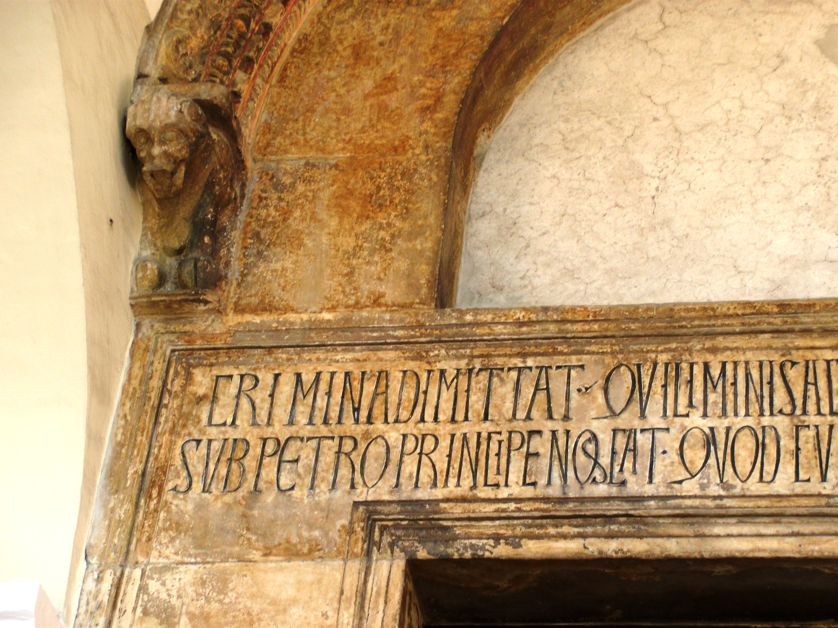 Chiesa di Sant'Angelo di Sant'Agata de' Goti (Italia)